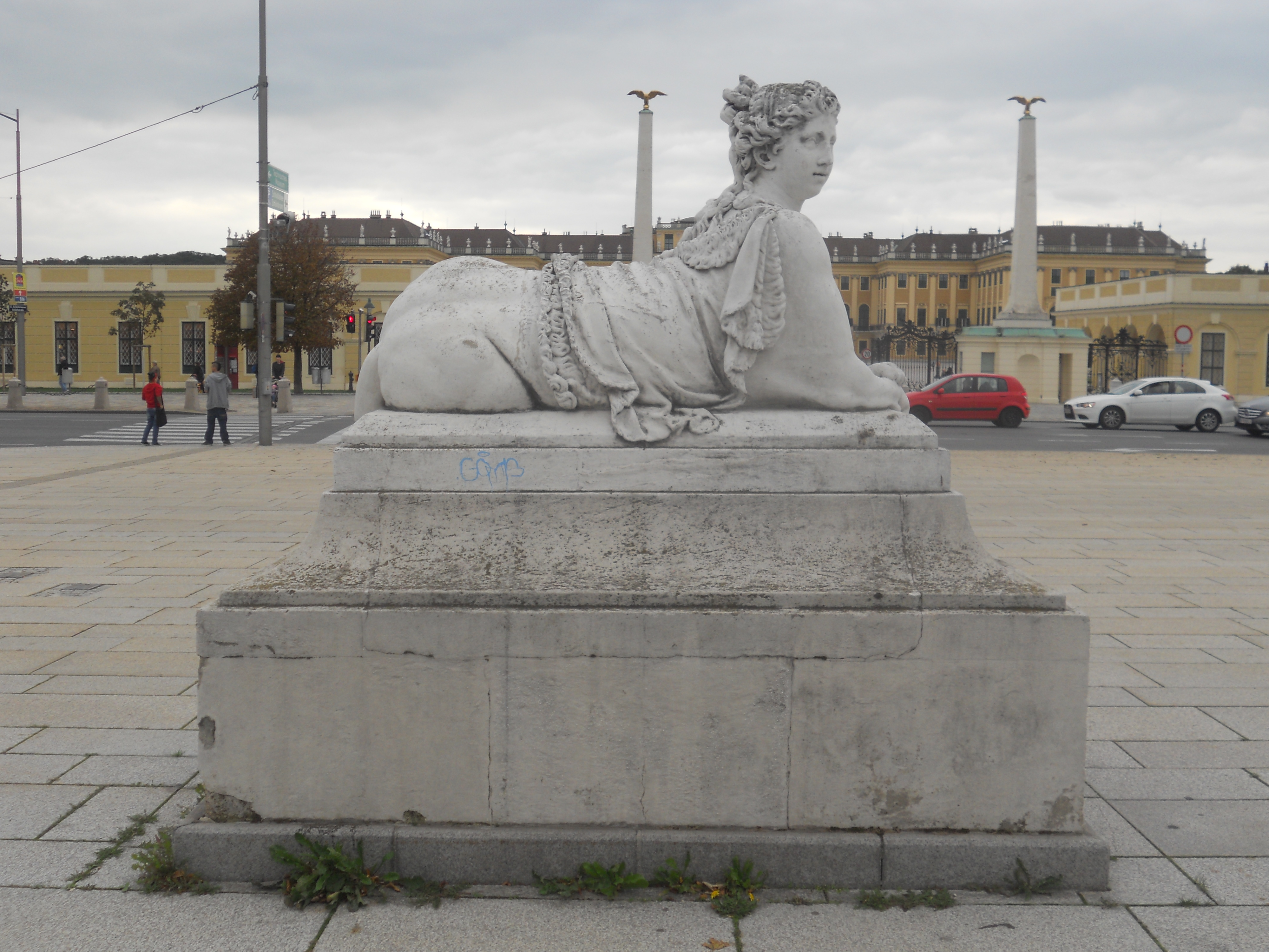 Linke Sphinx auf der Schönbrunner Schlossbrücke